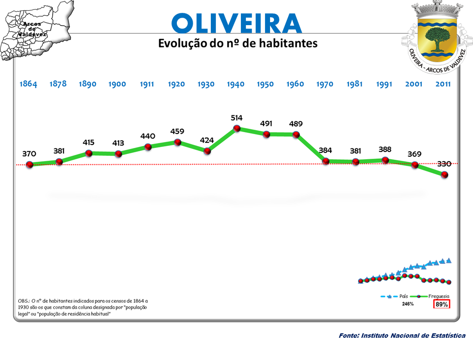 Censos 1864/2011